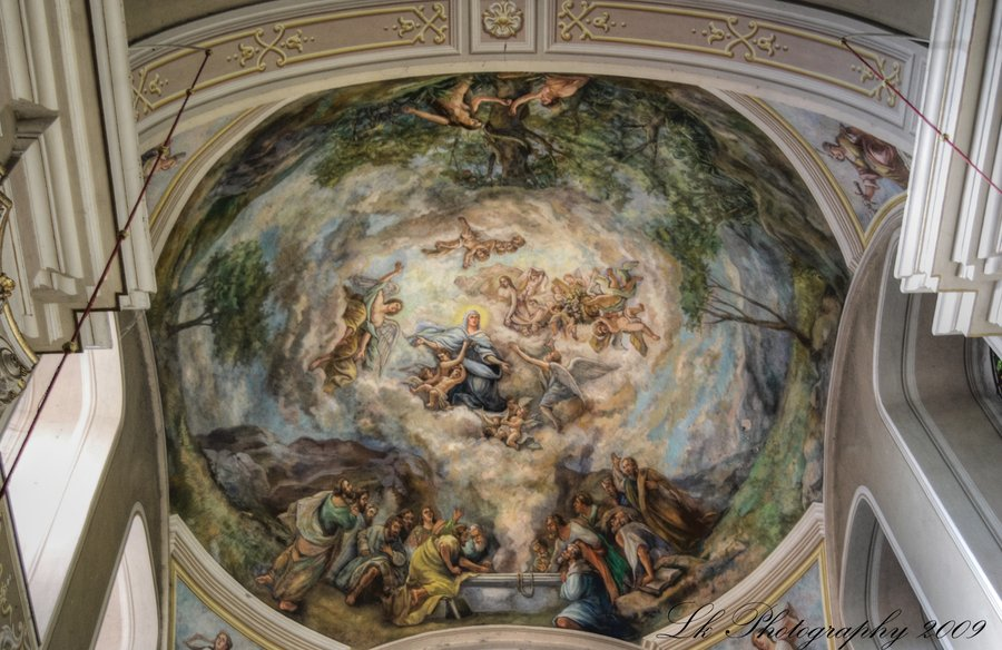 Biserica romano-catolică "Sf. Maria", Lipova, jud Arad 01